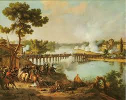 Наполеон отдаёт указания своим подразделениям во время форсирования реки Адды